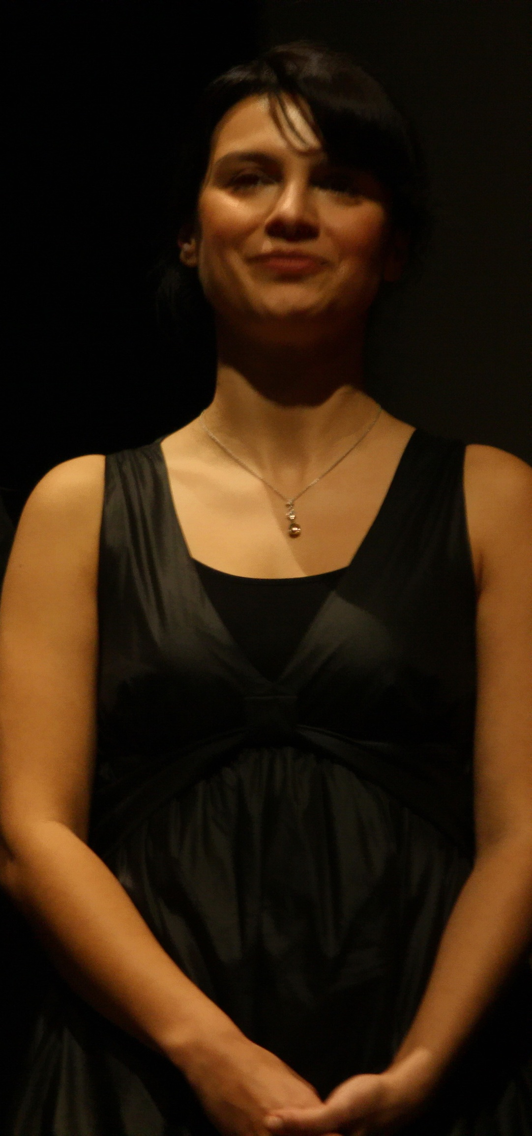 Rechts die Schauspielerin Feride Çetin vor der Aufführung des Films "Wir werden schoene Tage erleben". Aufführung fand im Gasteig zur Eröffnung der 23. Türkischen Filmtage statt.